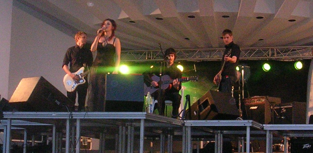 Sandy Mouche vid spelning i Lund, maj 2005. Copyright: Väsk 2005